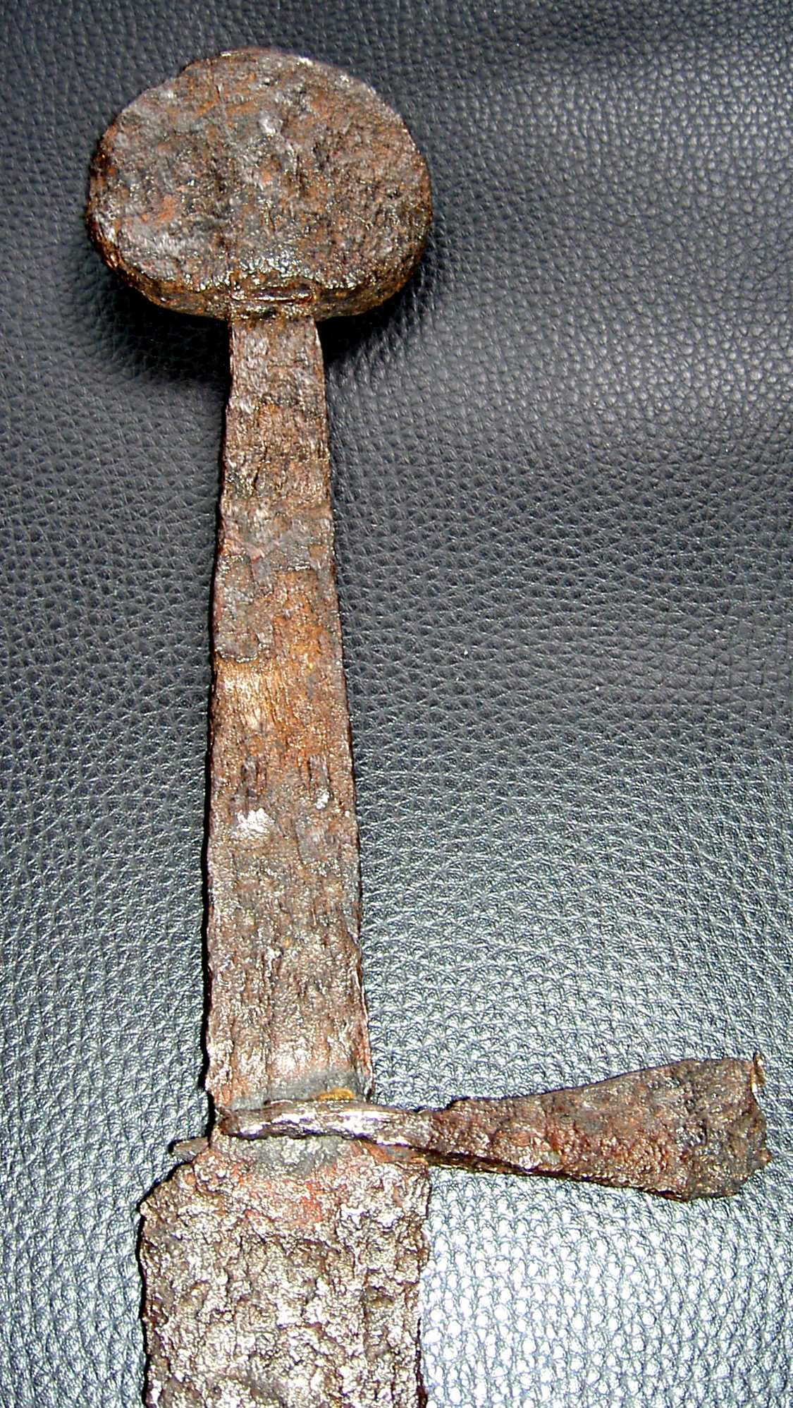 Ein hochmittelalterliches Borschwert.